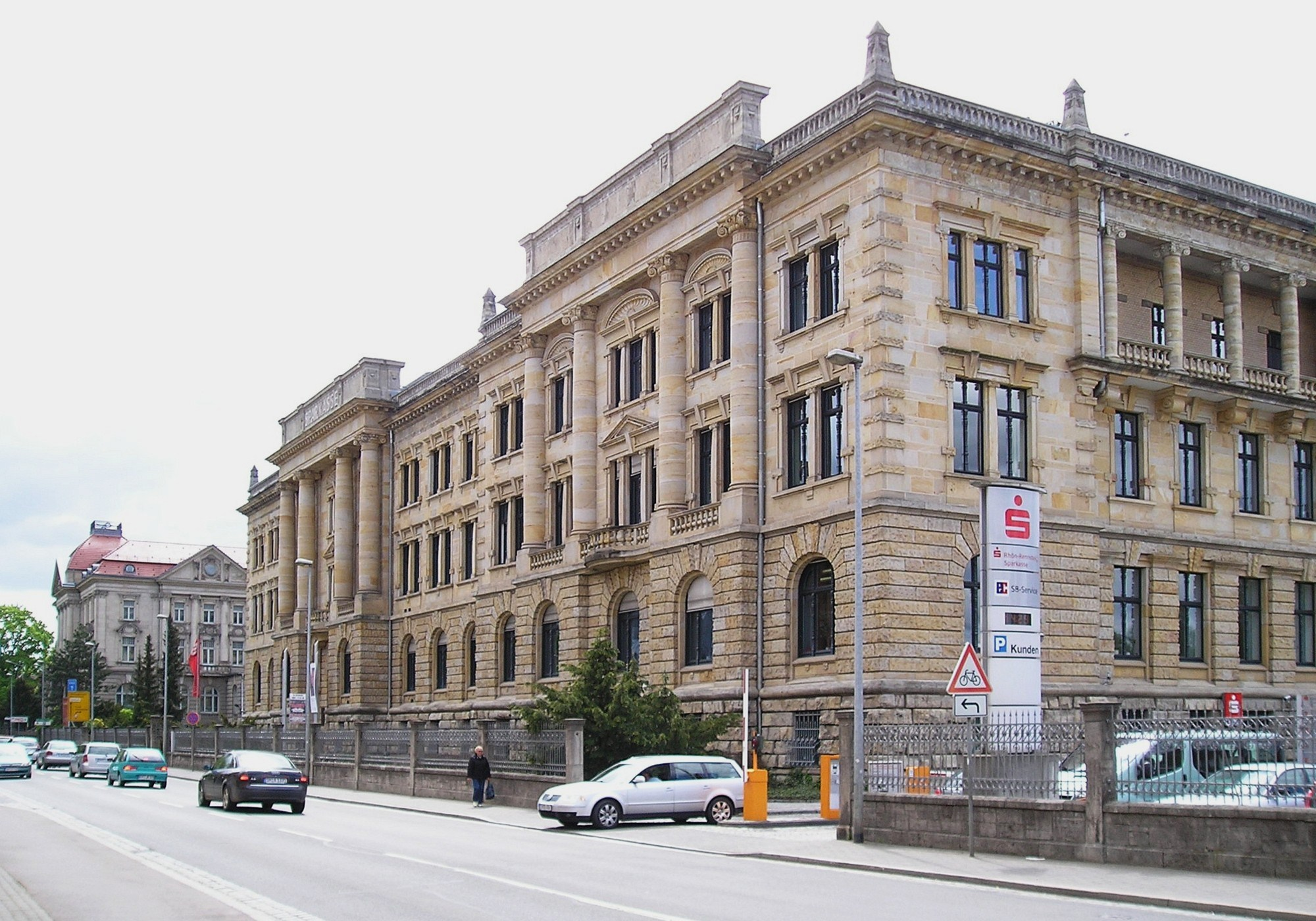 Die ehemaligen Großbanken Deutsche Hypothekenbank Meiningen (vorne) und Bank für Thüringen (hinten) im so genannten Bankenviertel von Meiningen